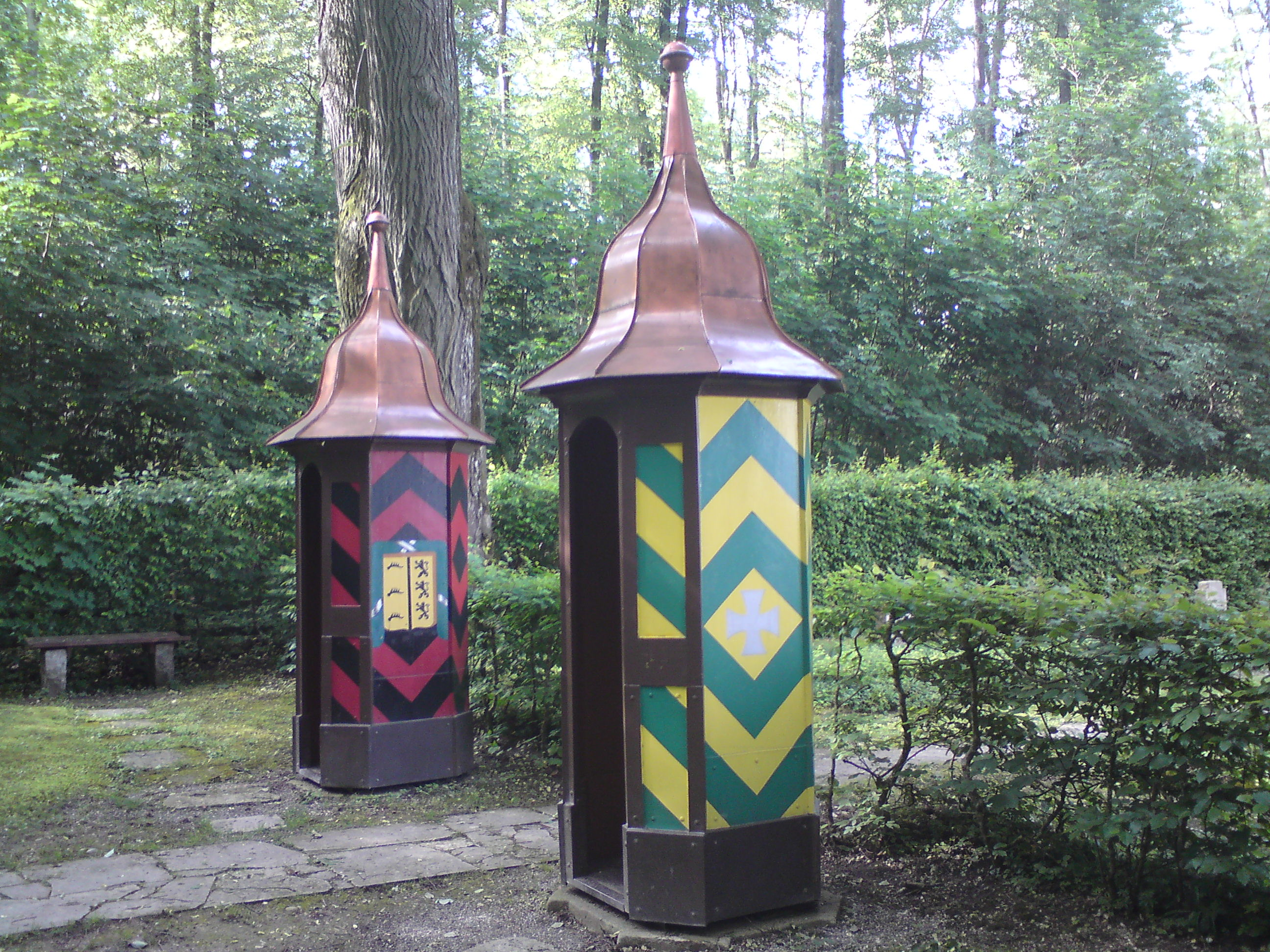 Die 2 Wachhäuschen am Eingang des historischen Soldatenfriedhofes Obermarchtal.